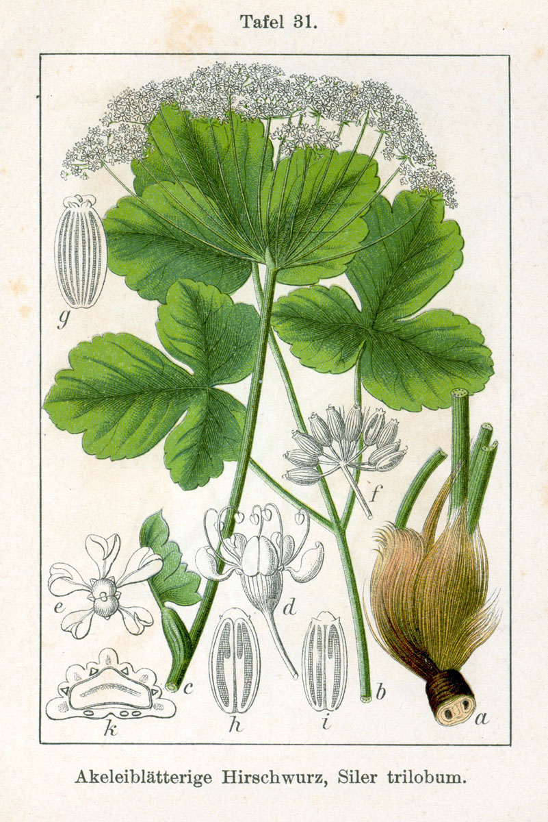 Laser trilobum (L.) Borkh., syn. Siler trilobum (L.) Crantz Original Description Akeleiblätterige Hirschwurz, Siler trilobum